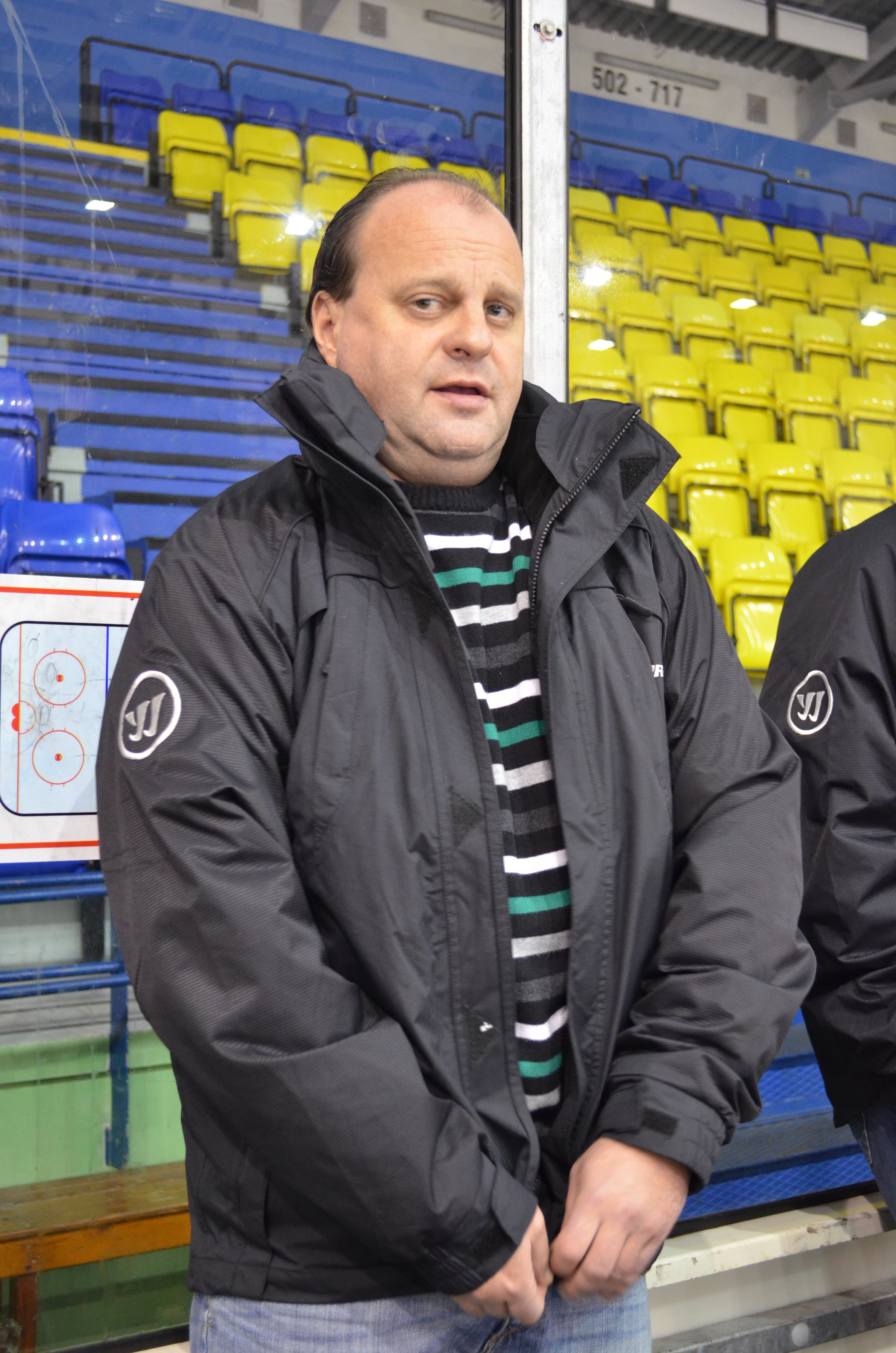 Kamil Kašťák - trenér HC Most